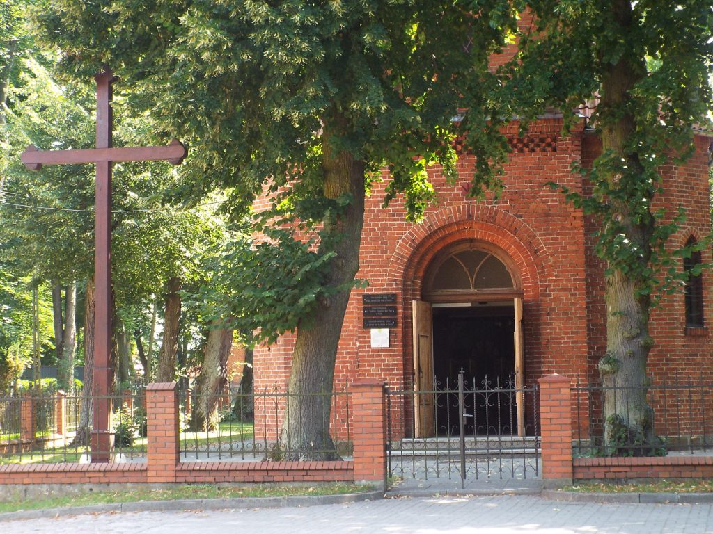 Pasłęk - Cerkiew Narodzenia Najświętszej Maryi Panny (dawniej kościół rzymsko-katolicki pw. św. Józefa)